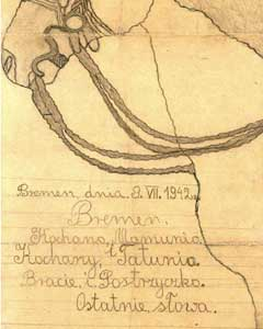 Brief mit Zeichnung (Ausschnitt)